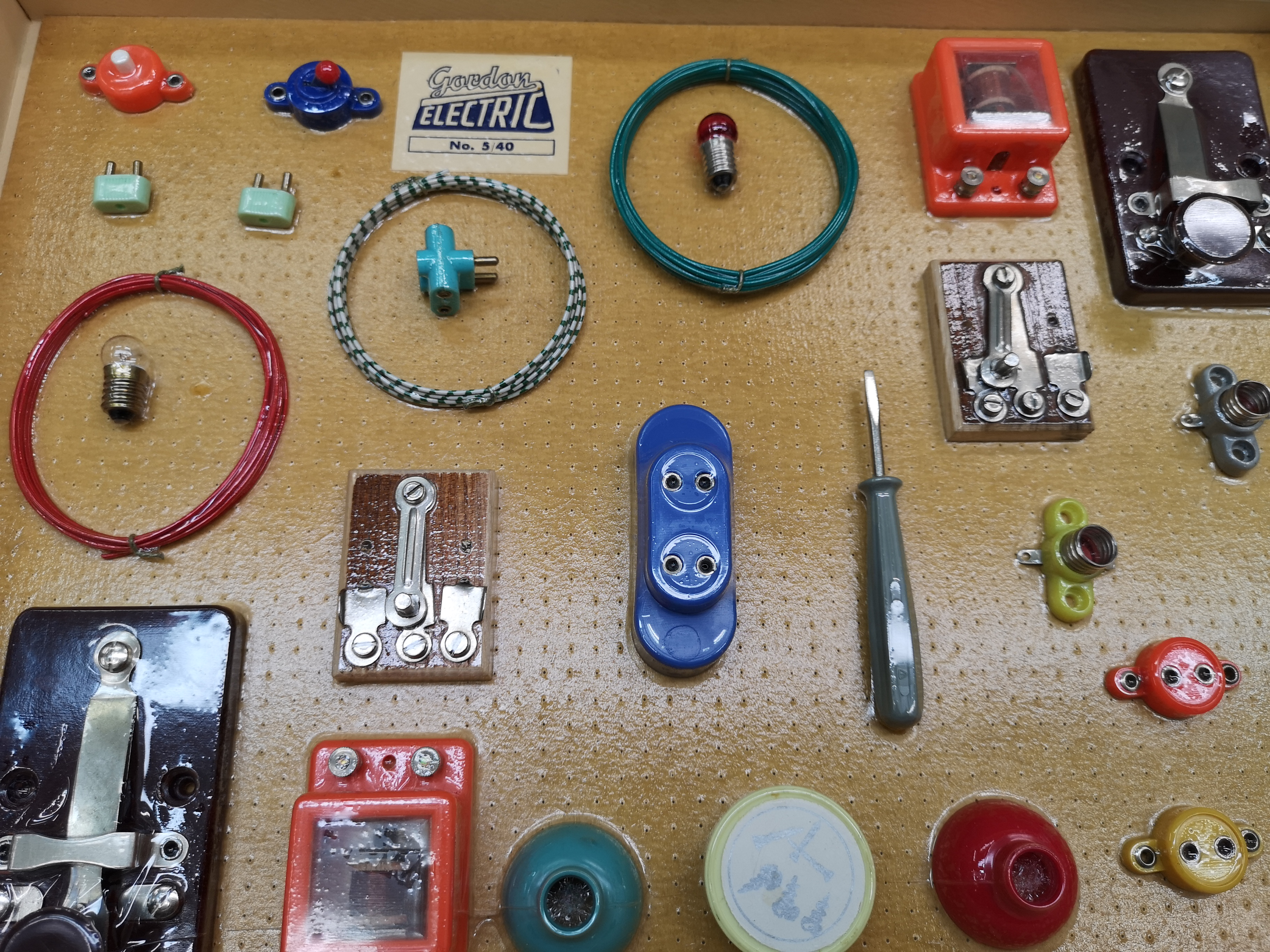 Lernspiel für Jugendliche in der DDR aus der Sammlung der Alltagsgegenstände im Museum Europäischer Kulturen